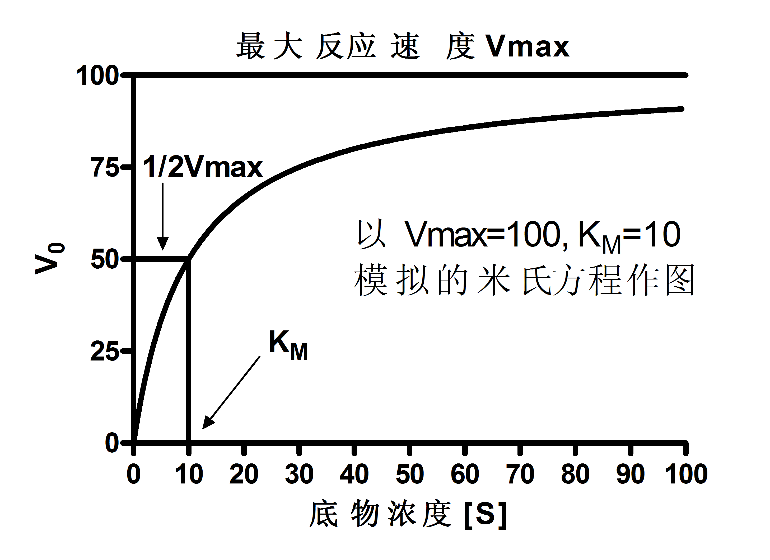 米氏方程作图